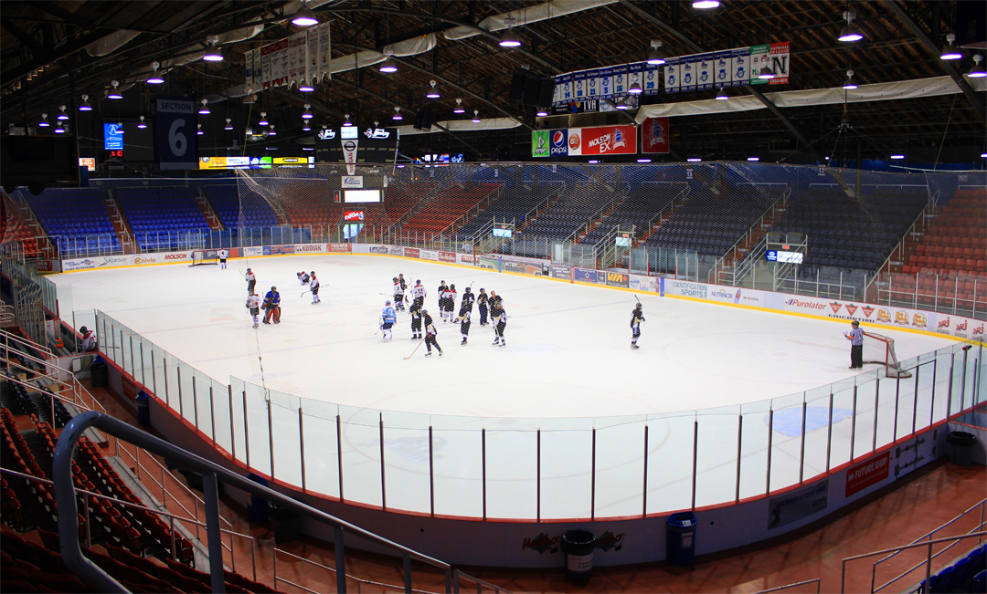 Intérieur du Centre George-Vézina, Chicoutimi